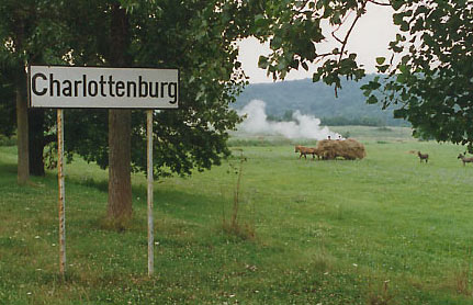 Dorfeingang Charlottenburg, Banat, Rumänien